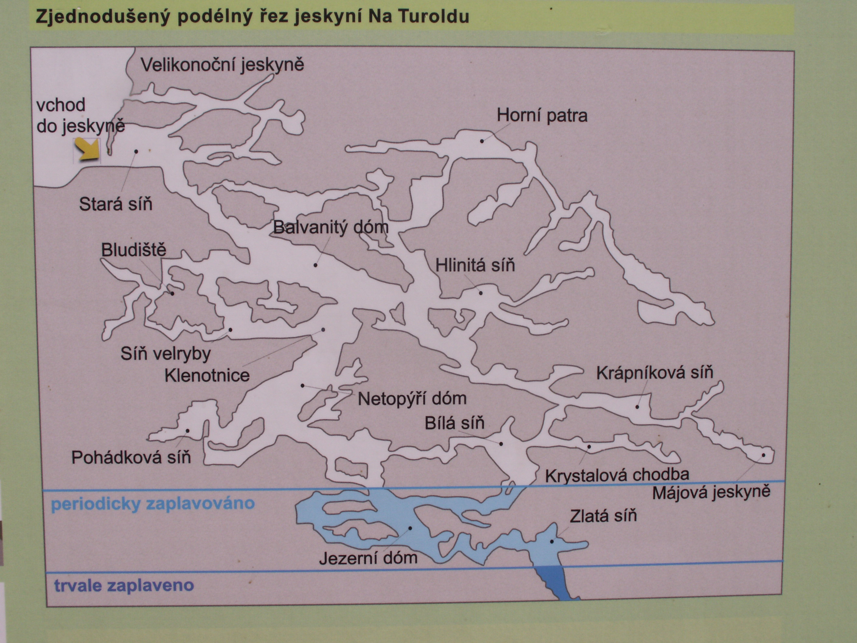 informační turistická tabule znázorňující zjednodušený řez jeskyní Na Turoldu, Mikulov